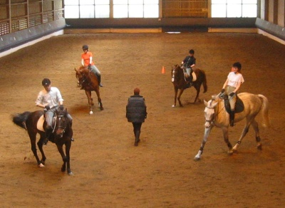 Quadrille - Hier in der Reitschule Großhelfendorf bei München